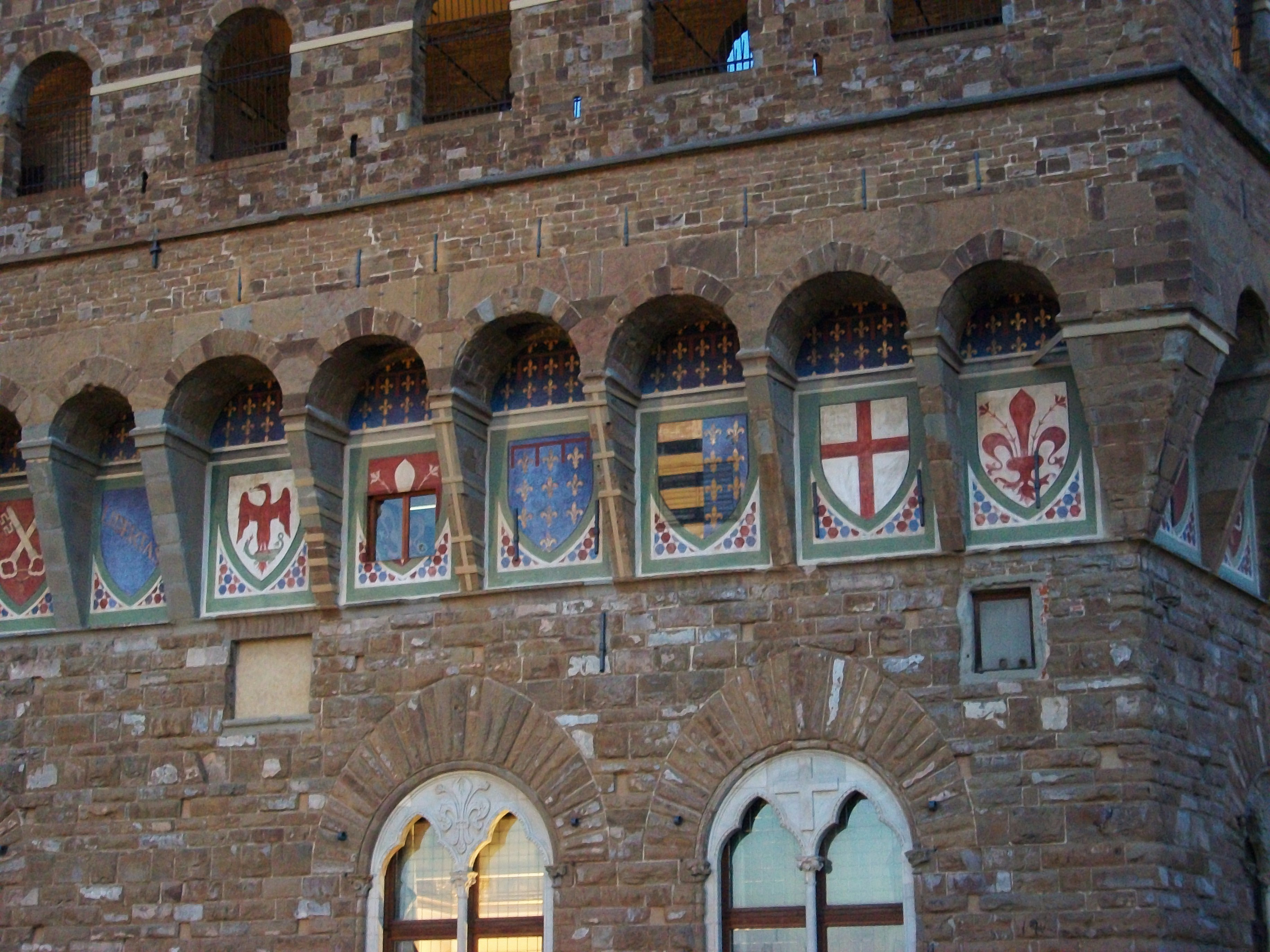 Escuts a la façana del Palazzo Vecchio, Florència.